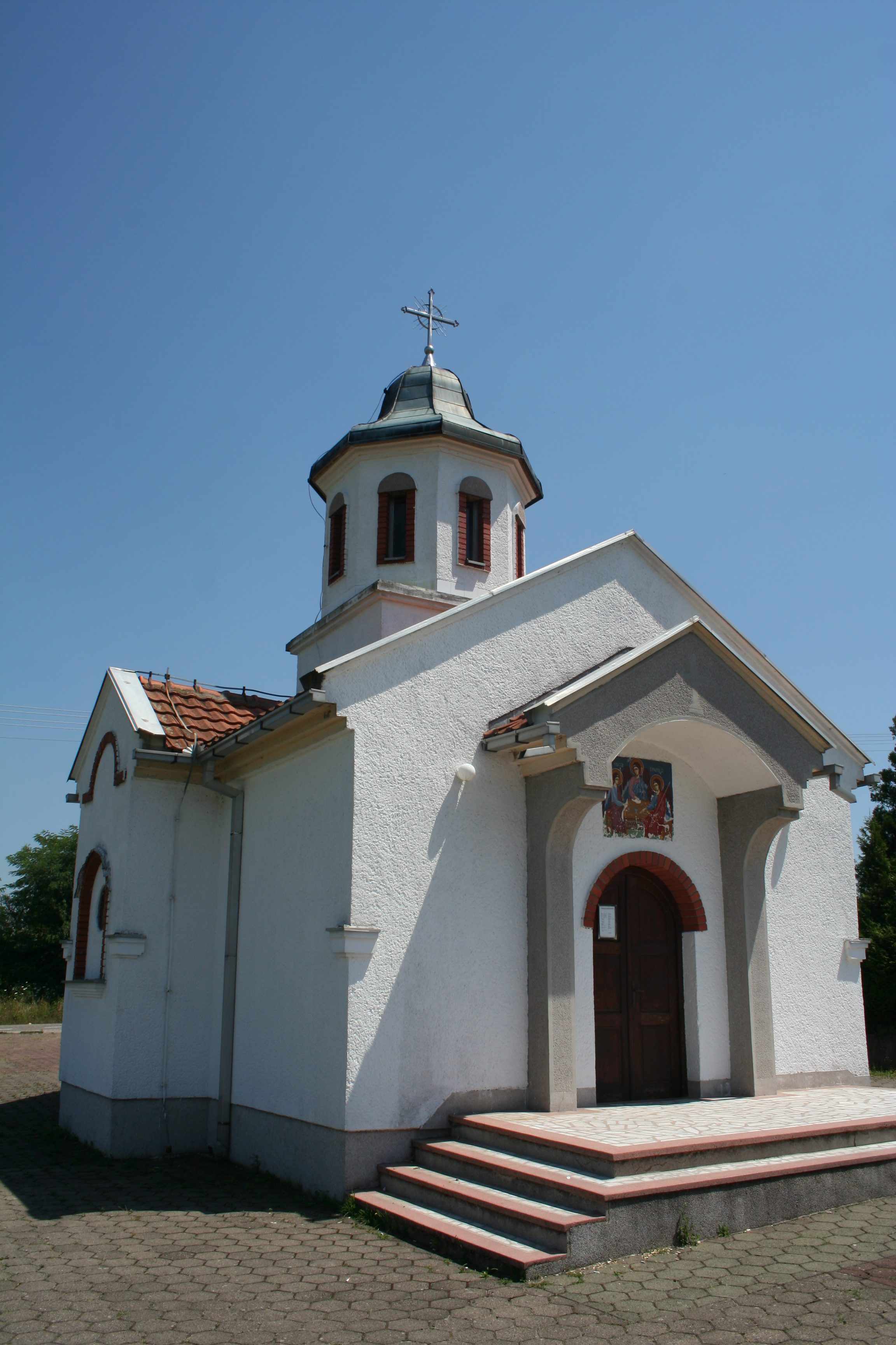 Crkva Sv. Marine, Grnčara